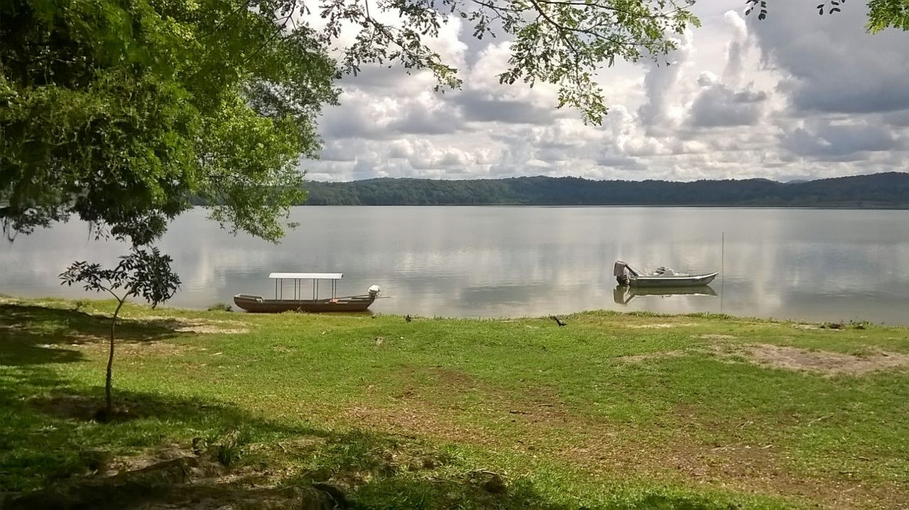 Área de Proteção Ambiental da Lagoa Encantada, Ilhéus.